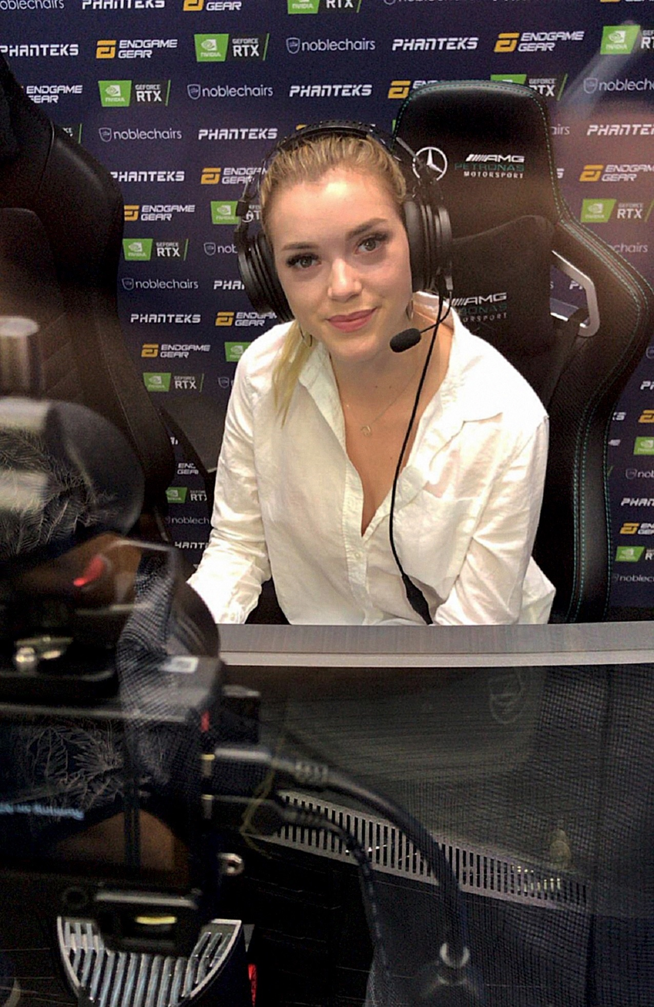 GamesCom 2019 in Köln